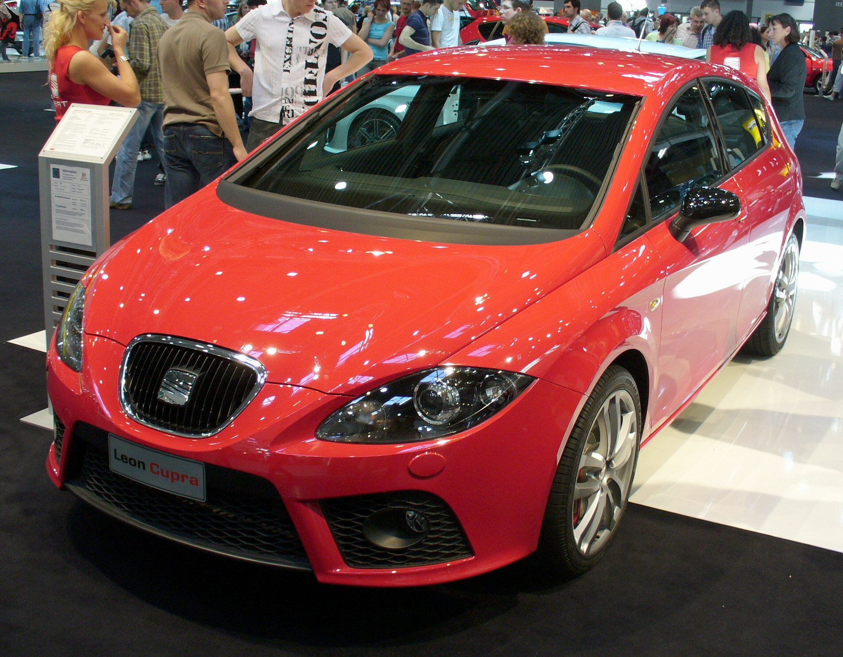 Seat Leon Cupra